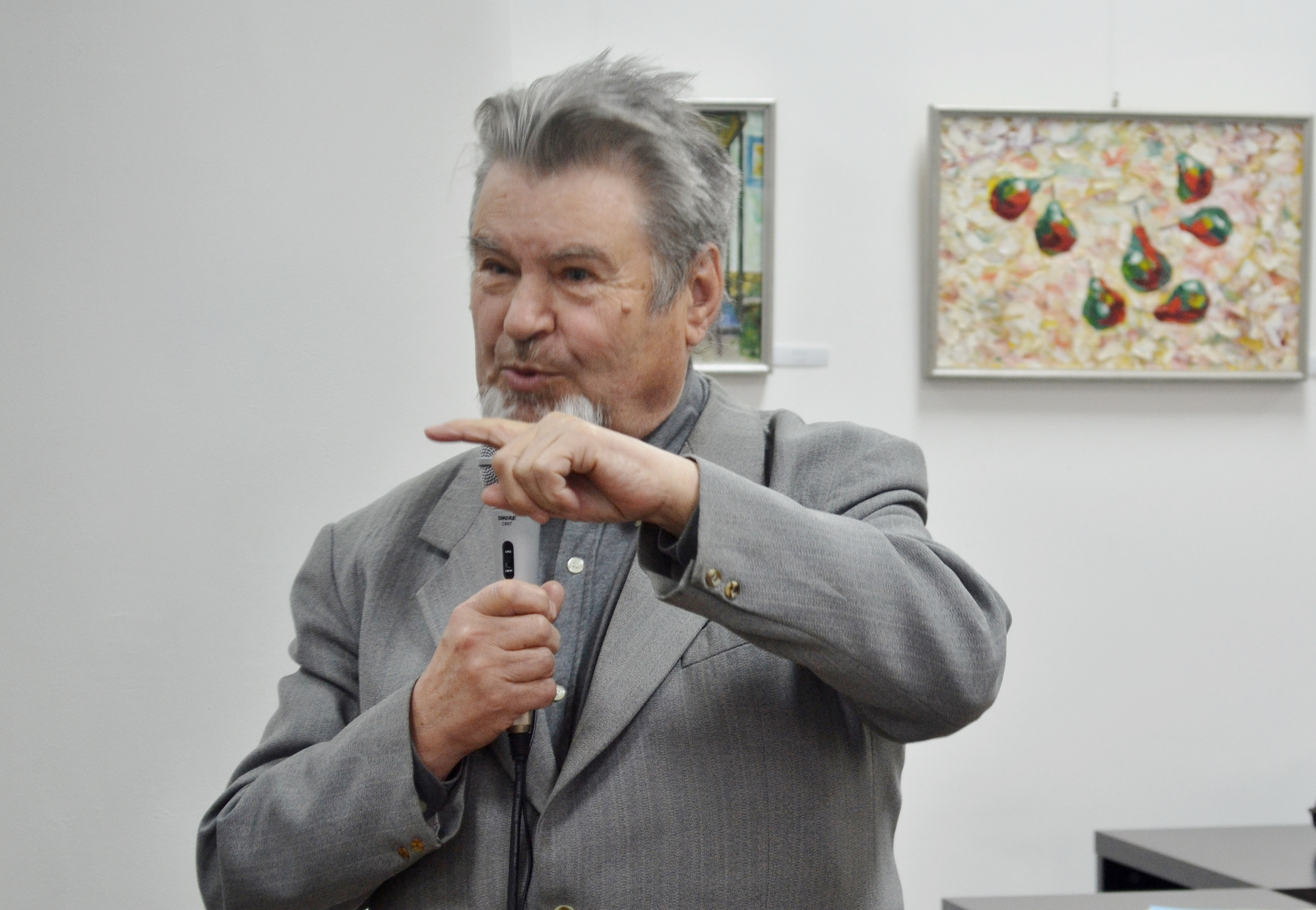 Lansare de carte „Luciferice flori sau Edenul pierdut”. Ion Ciocanu.